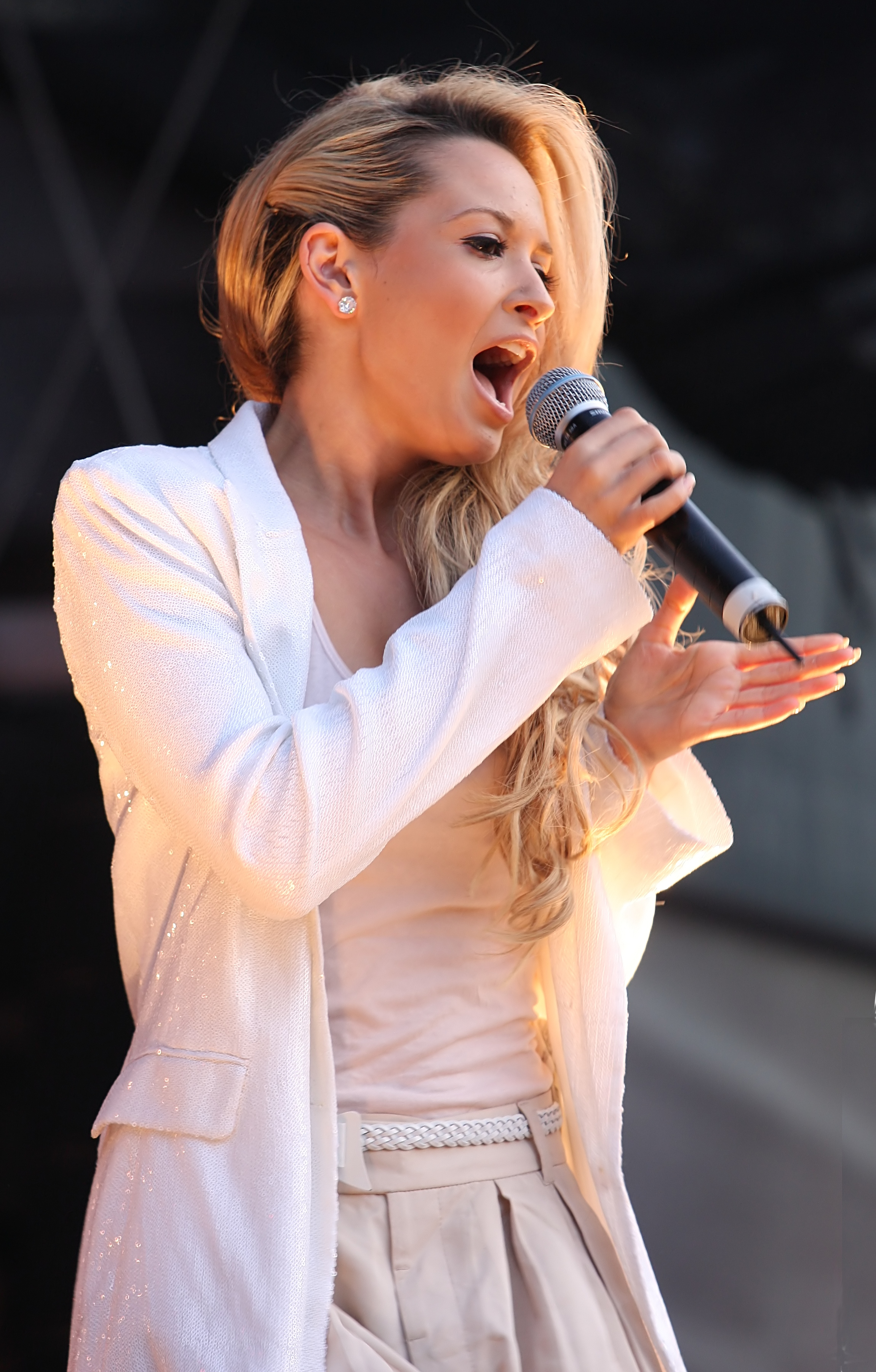 Die Gruppe „Monrose“ - Mandy Capristo - auf der Hauptbühne auf dem Heumarkt, Köln. Bühnenprogramm zum CSD-Straßenfest/ColognePride 2009.